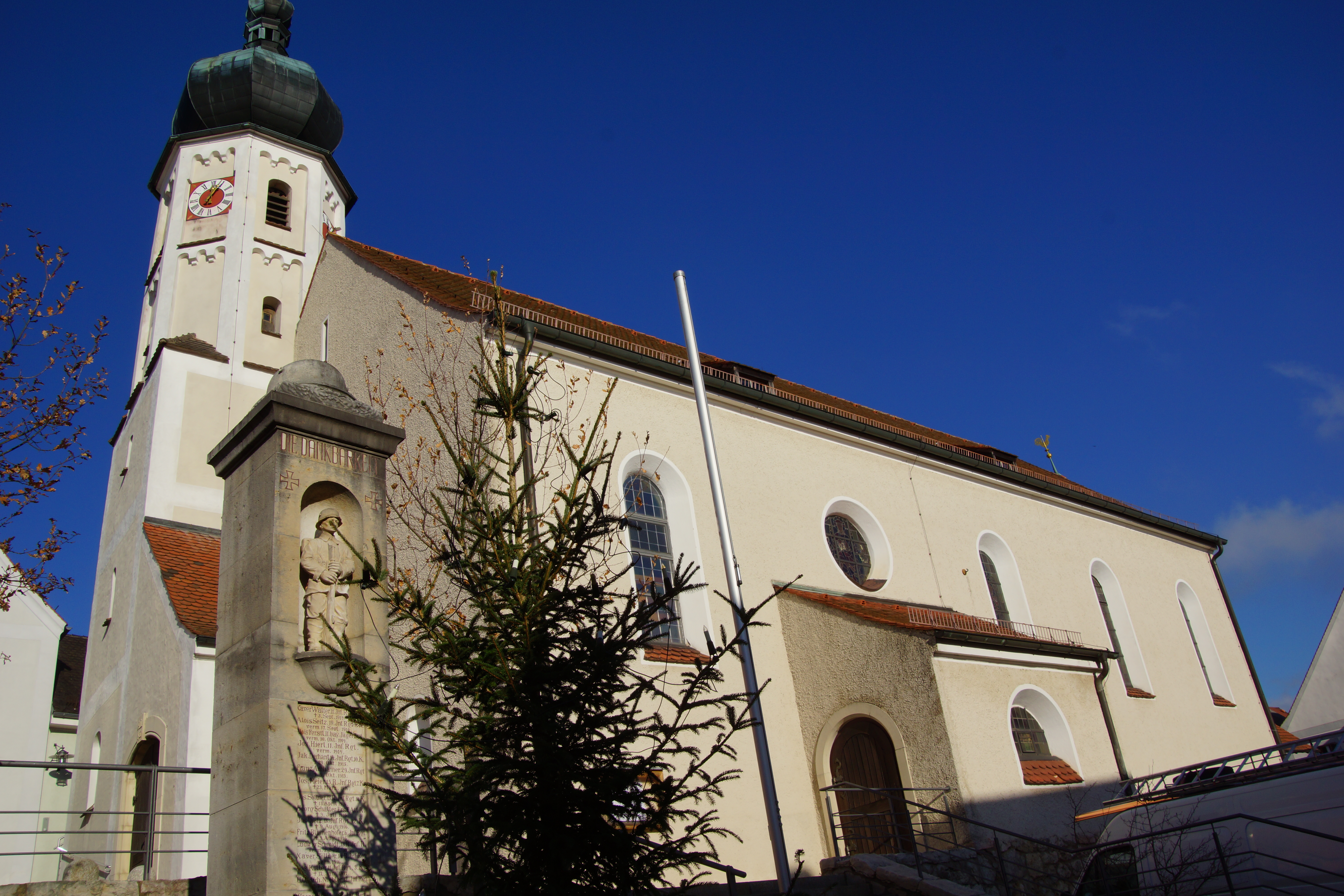 Markt Lupburg in der Oberpfalz / Landkreis Neumarkt